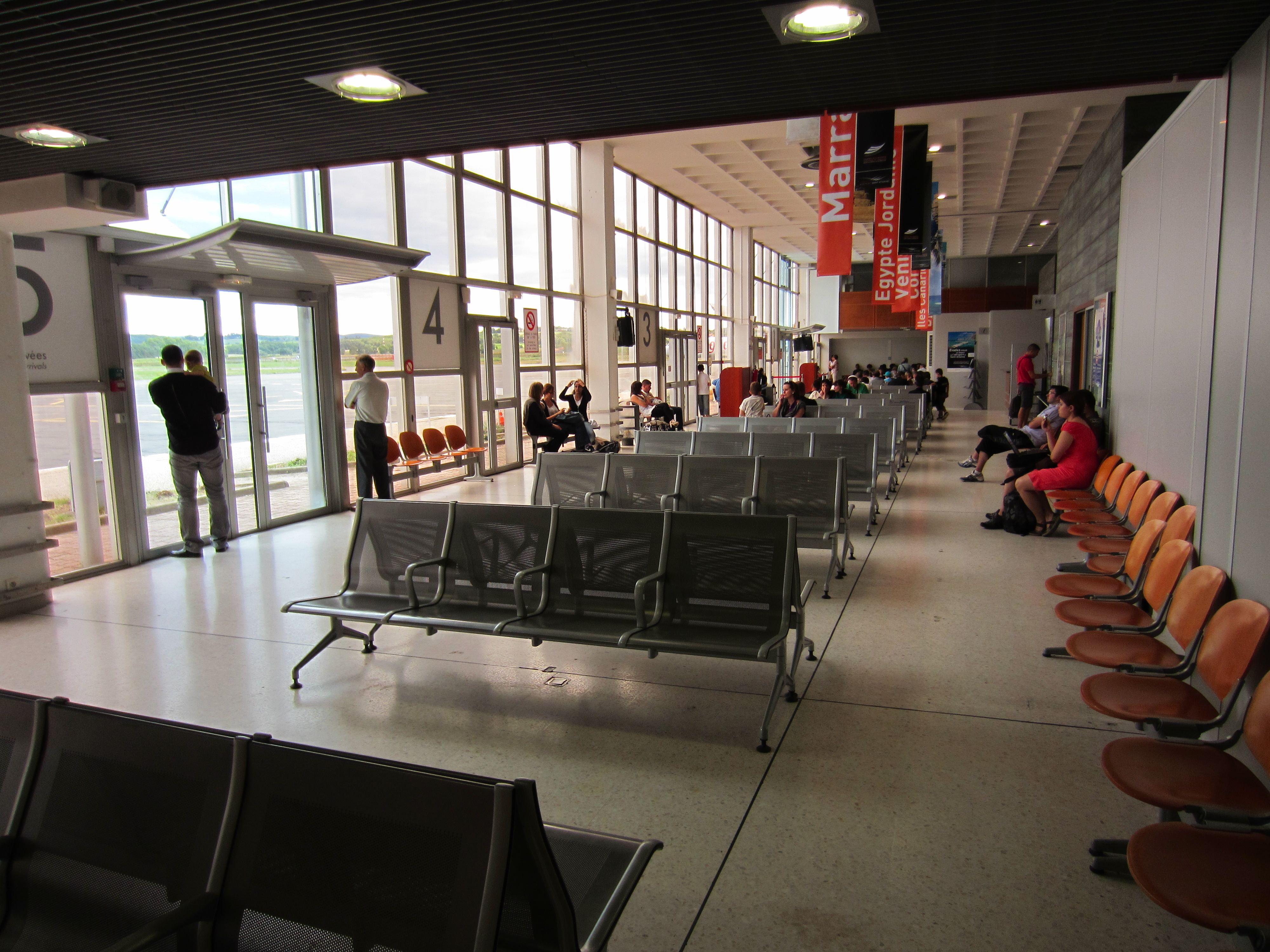 Terminal aéroport Andrézieux-Bouthéon EBU